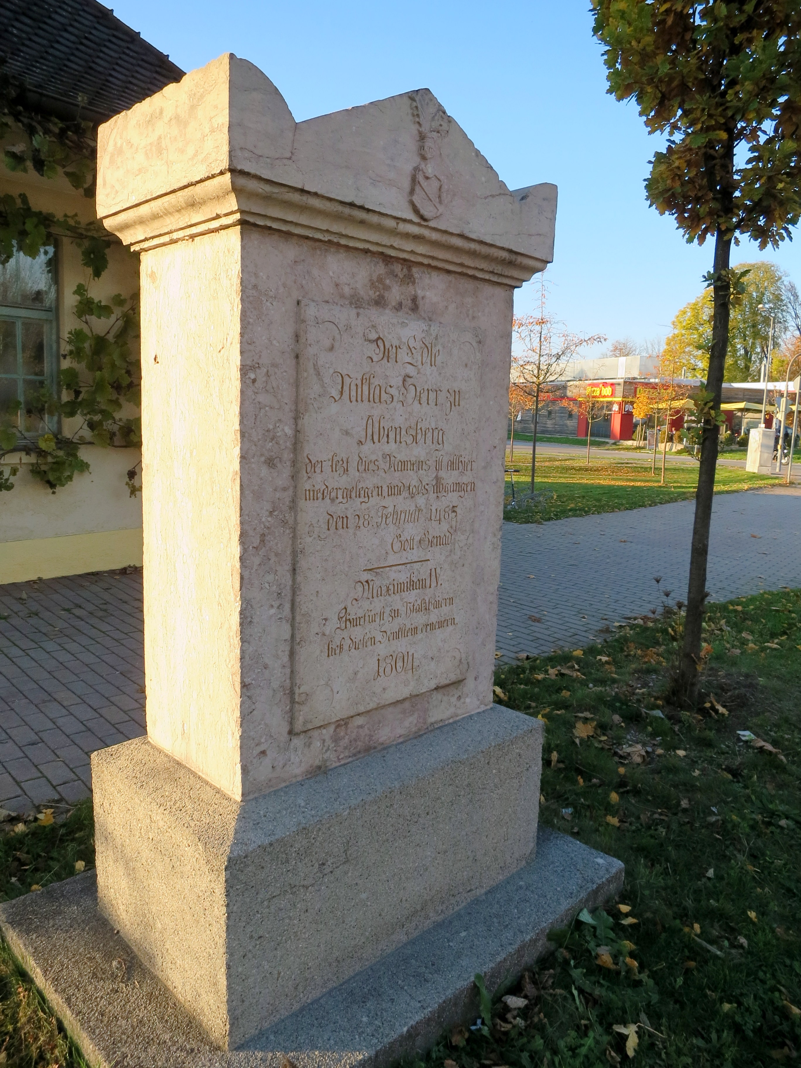 Antikisierender Gedenkstein für Nikolaus von Abensberg (+ 1485)